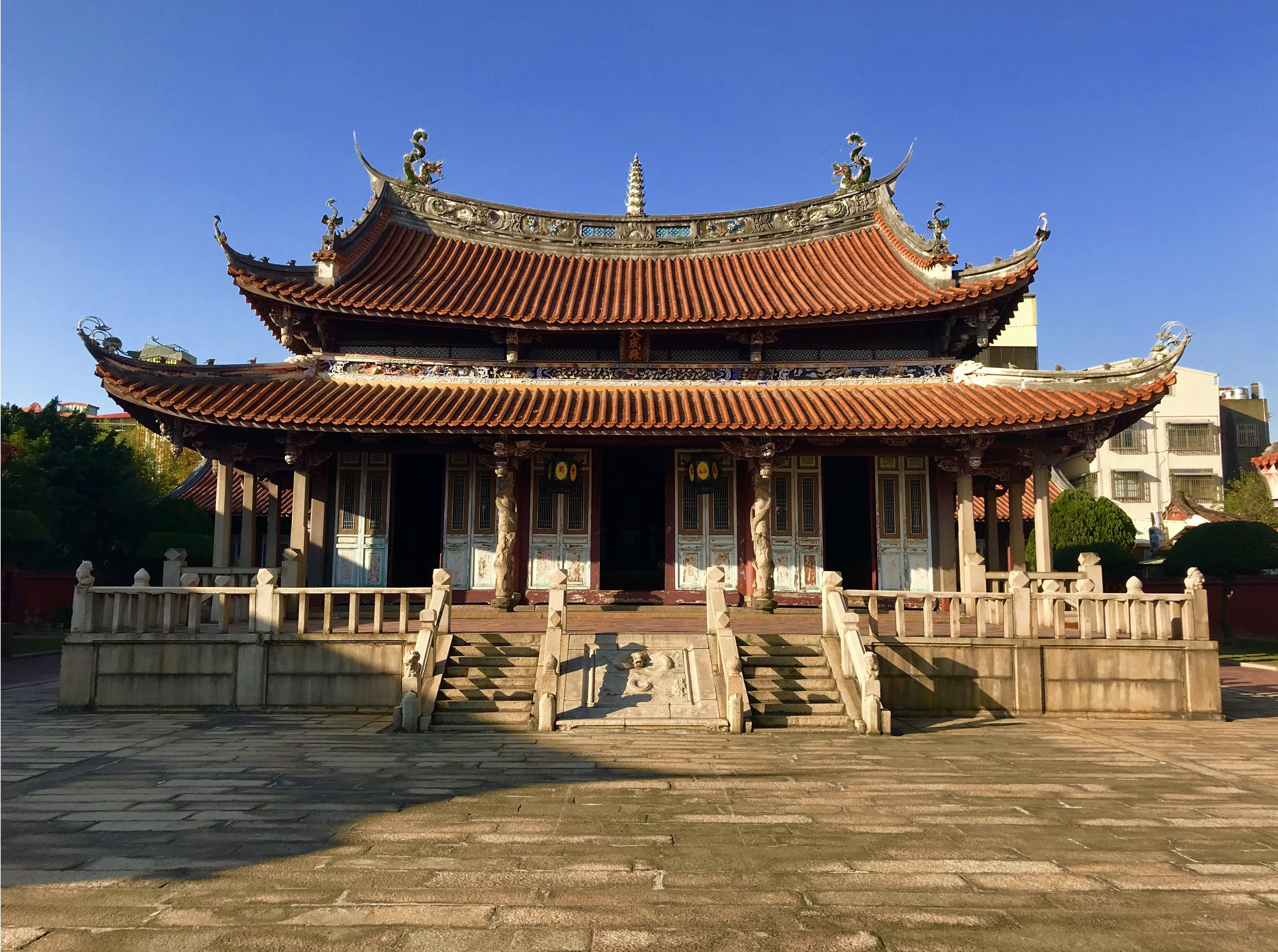 中文（台灣）: 彰化孔子廟大成殿